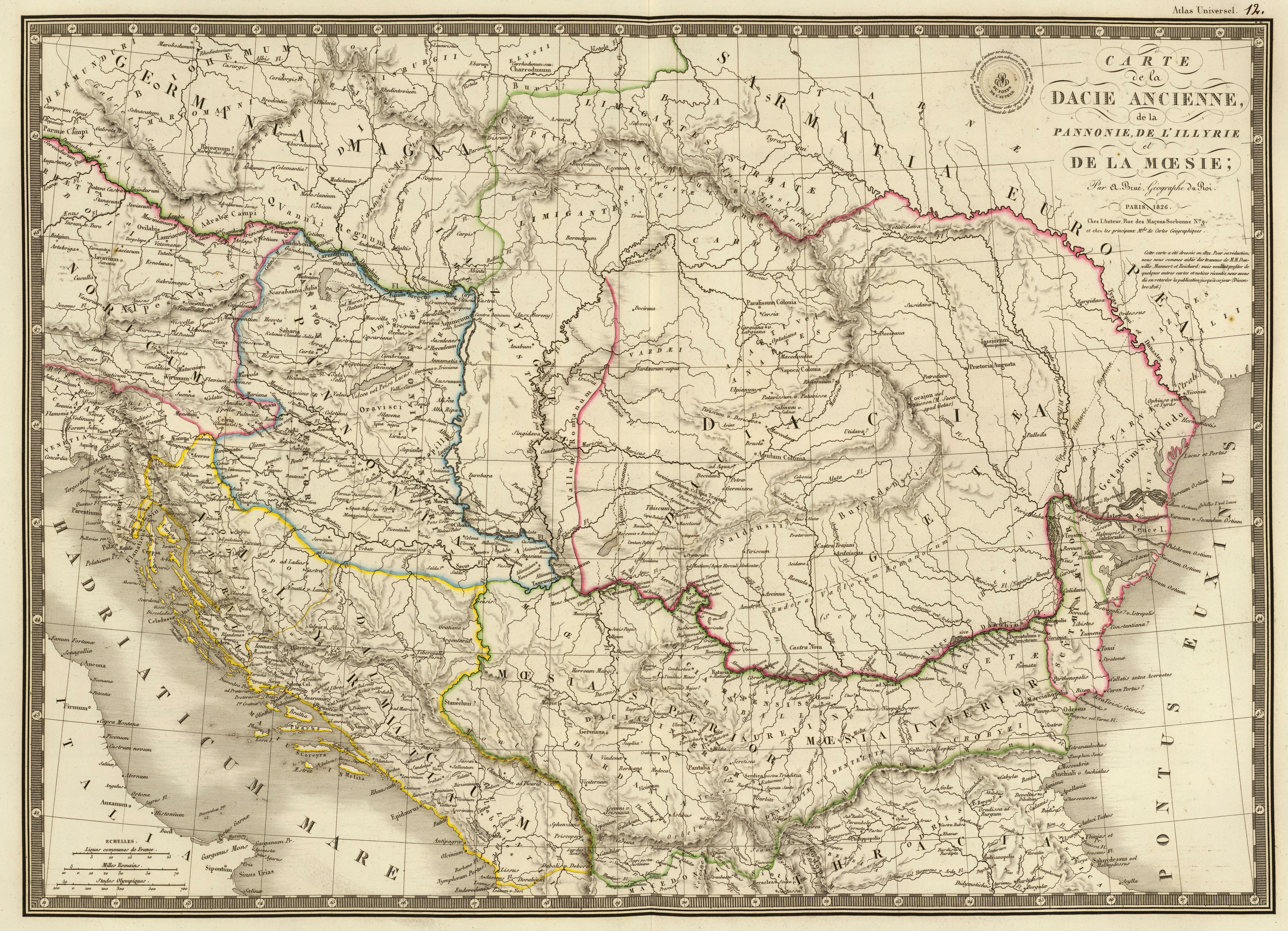 Harta Daciei, Panoniei, Iliria și Moesia. 1786-1832